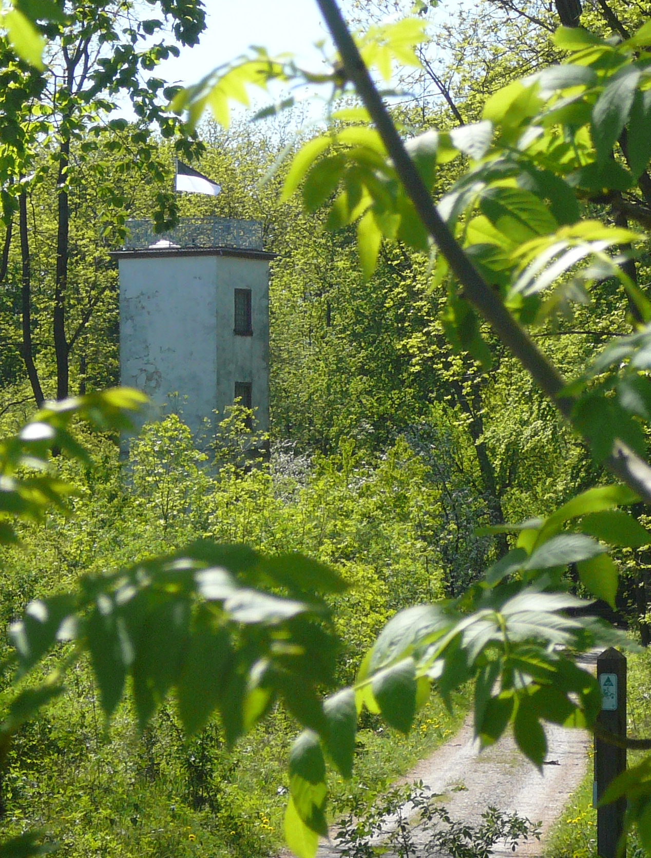 Königlich preußische optische Telegraphenstation Nr. 28, 1833. Turm der preußischen optischen Telegraphenlinie von Berlin nach Koblenz auf dem Burgberg, Gemeinde Golmbach, Niedersachsen. Turmhöhe: 14 m, ursprünglich mit angeschlossenem Wohnhaus.